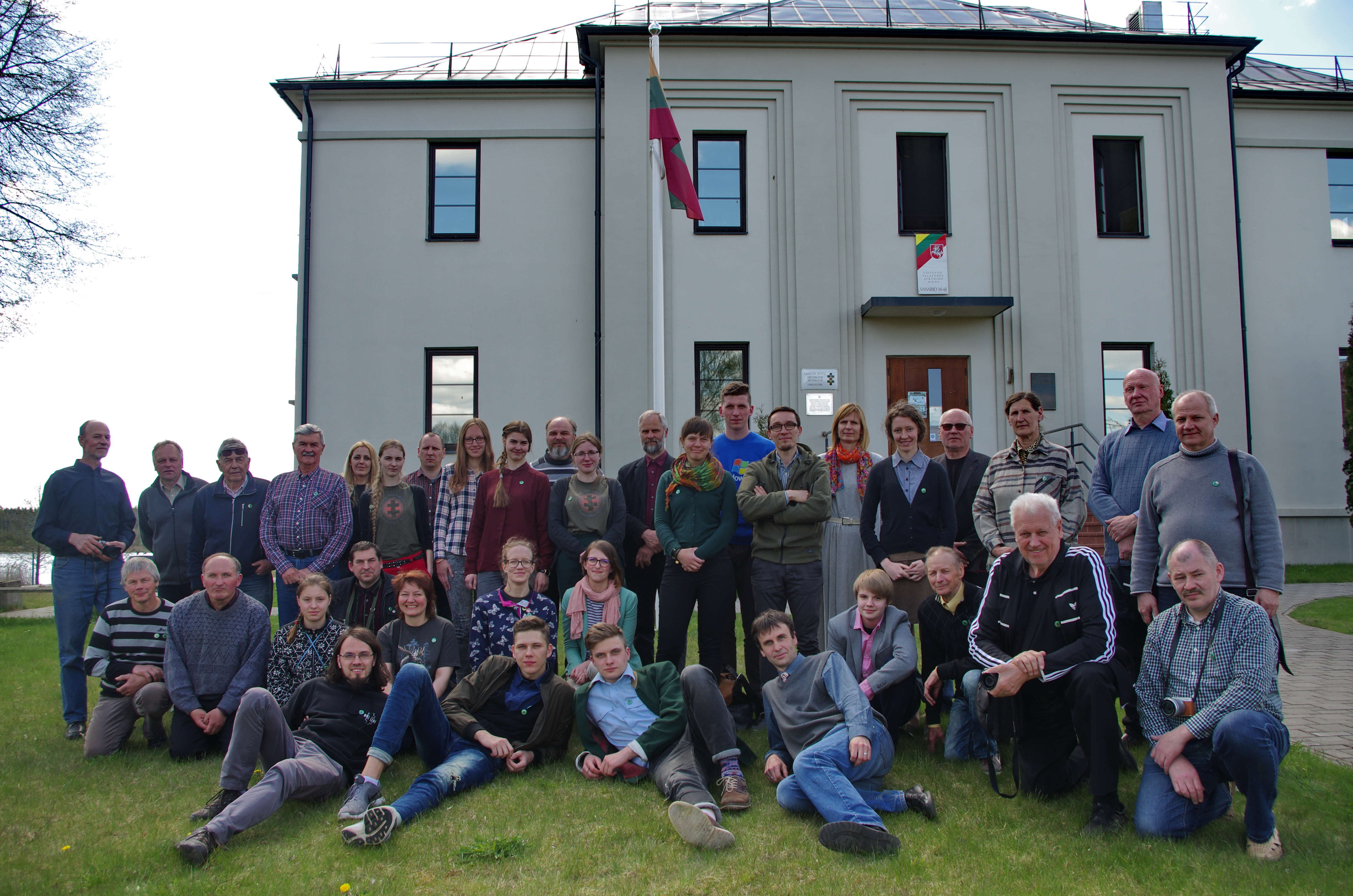 2017 m. Lietuvos Laisvės Kovos Įamžintojų sąskrydžio dalyviai (Laisvės kovų muziejus Obeliuose, Rokiškio r.)